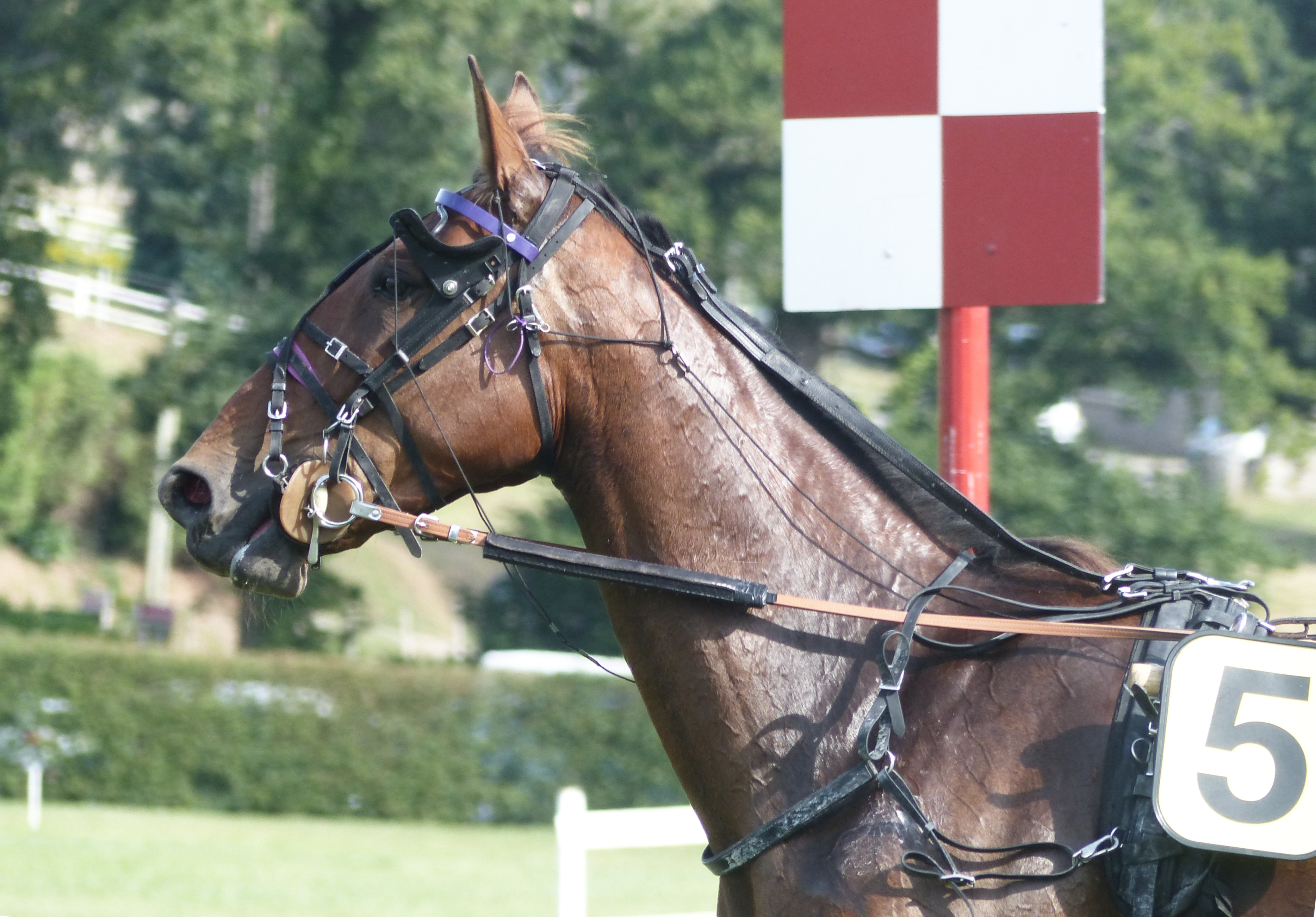 Tête de la jument Trotteur français baie Eureka Jeunilat, portant des œillères pivotantes, des bouchons d'oreille mobiles, un enrênement supérieur et une rêne à picots